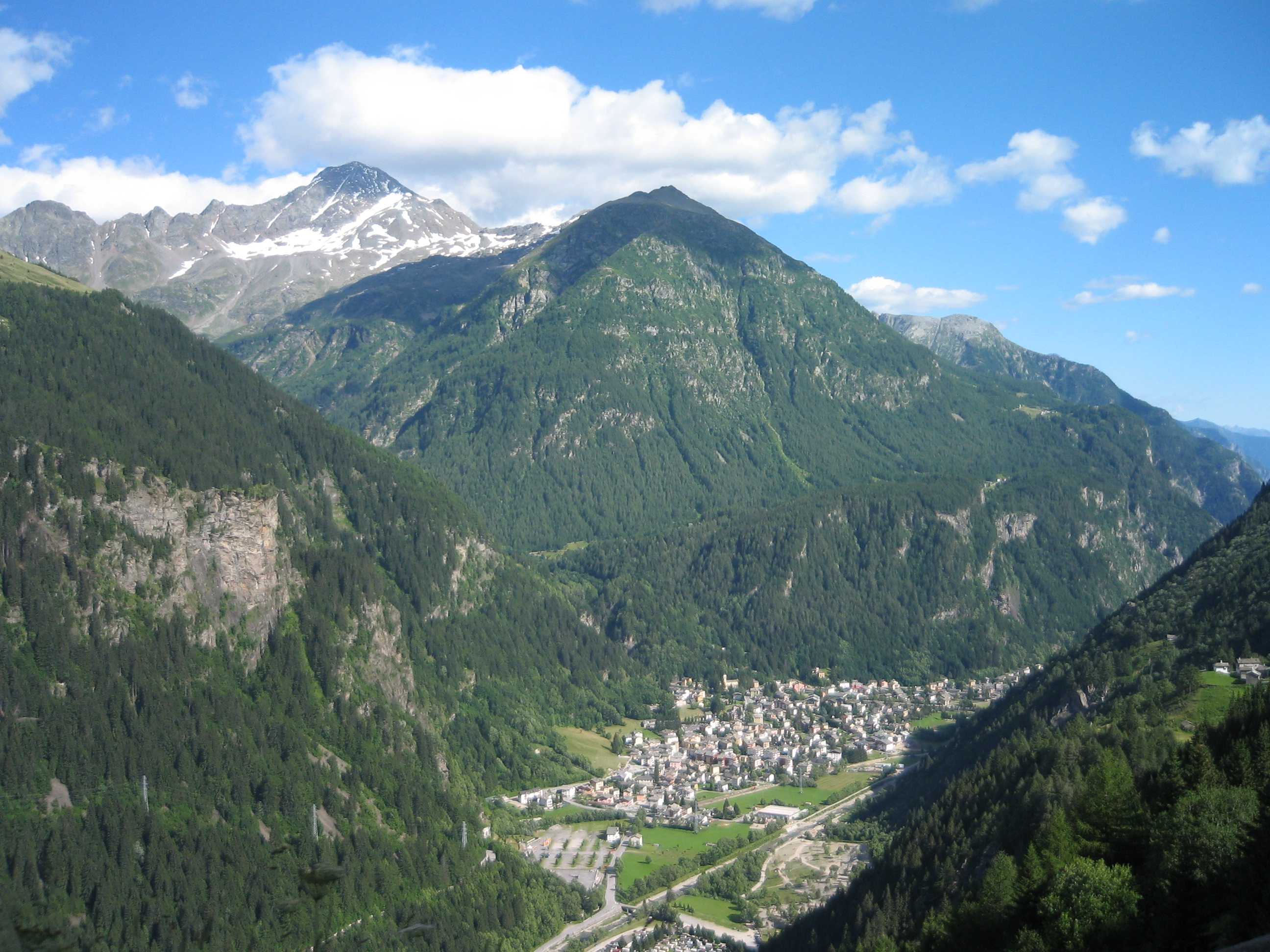 autore: Losa Anna descrizione: Campodolcino fotografato da Starleggia